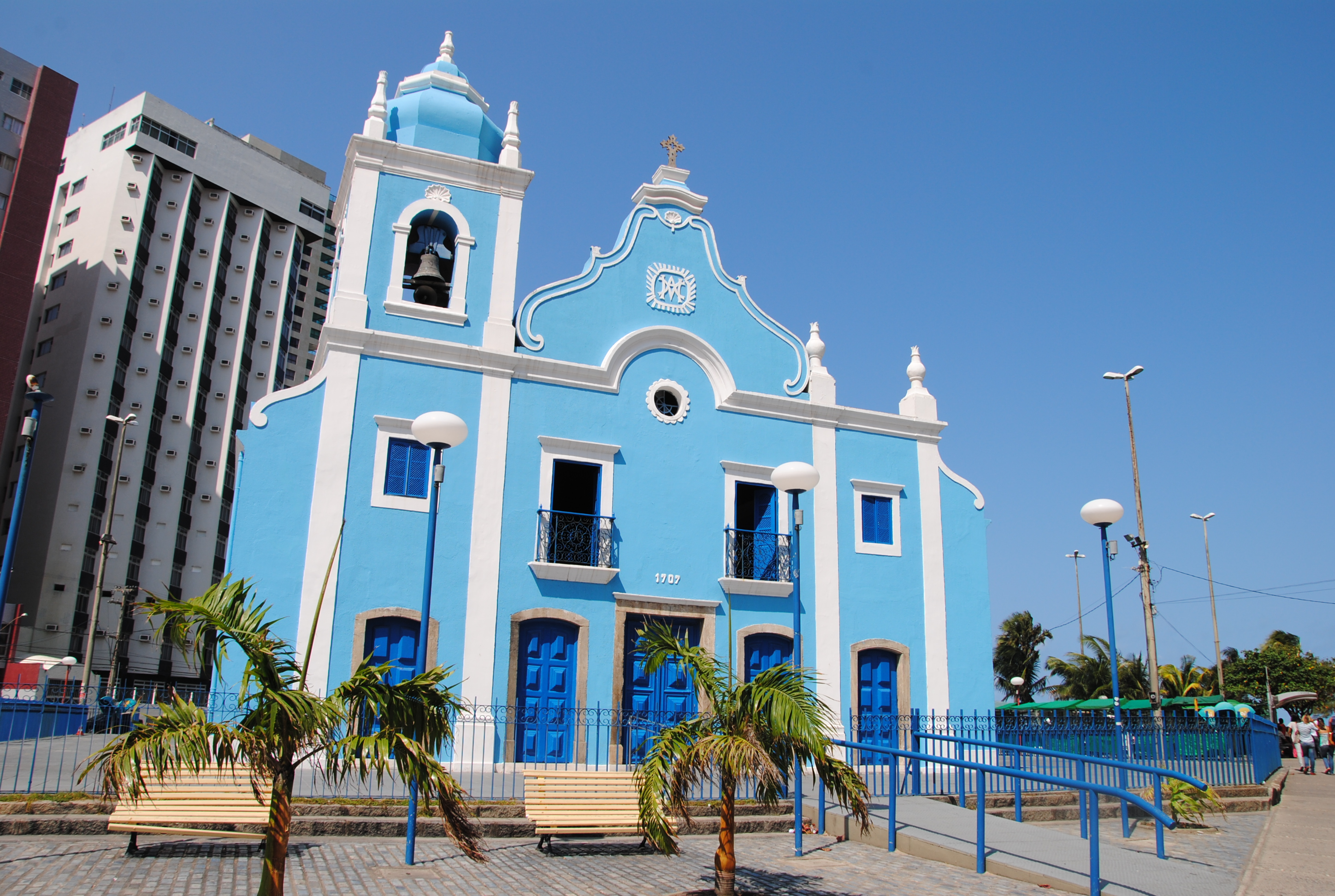 Igreja de Nossa Senhora da Boa Viagem - Recife - Pernambuco - Brasil